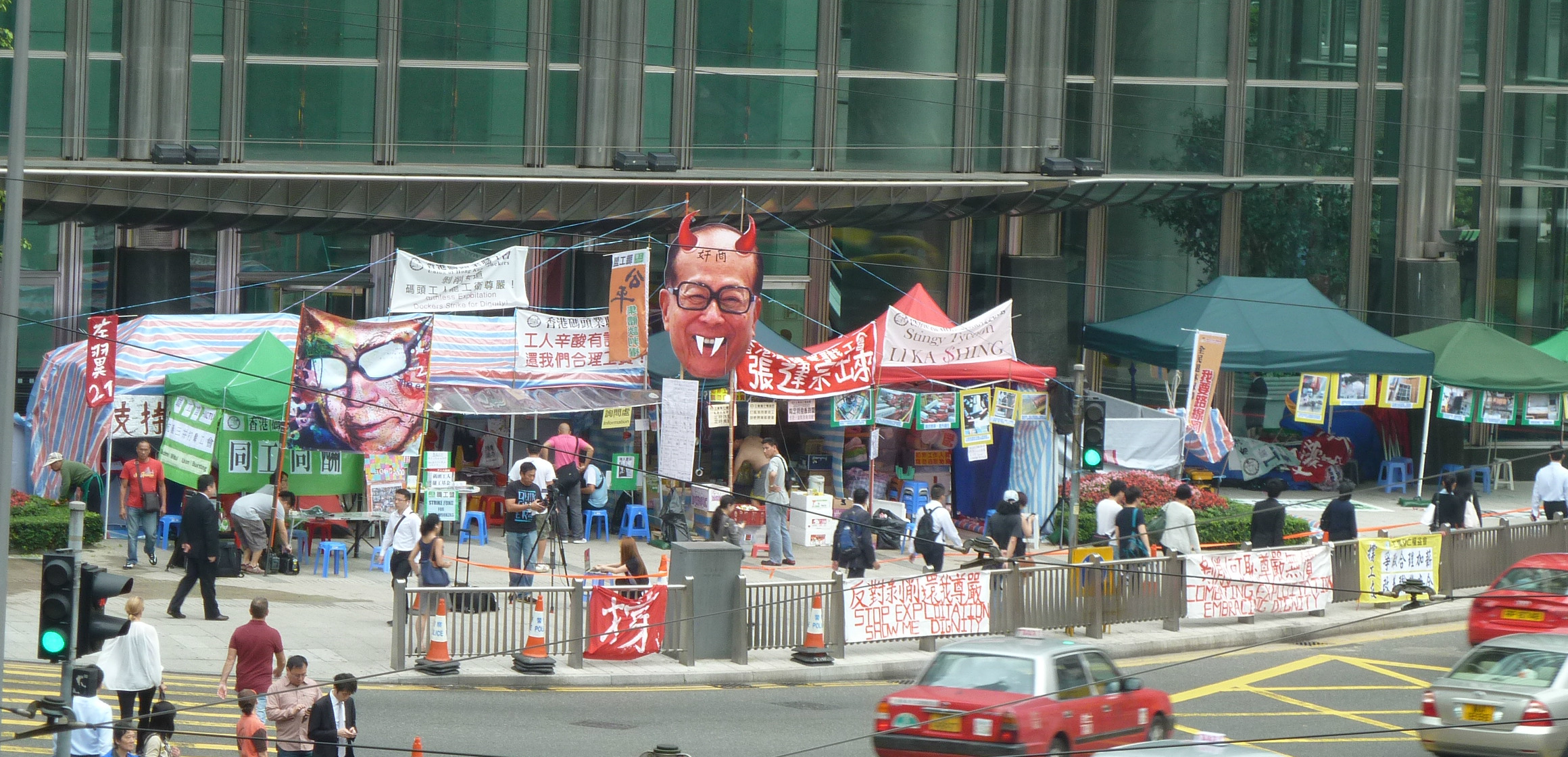 2013年葵青貨櫃碼頭工潮第28日: 在長江中心外抗議者和職工盟爭議個人化於李嘉誠 Strikers set up camp with placards and effigies outside Cheung Kong Center on day 28 of the 2013 Hong Kong dock strike